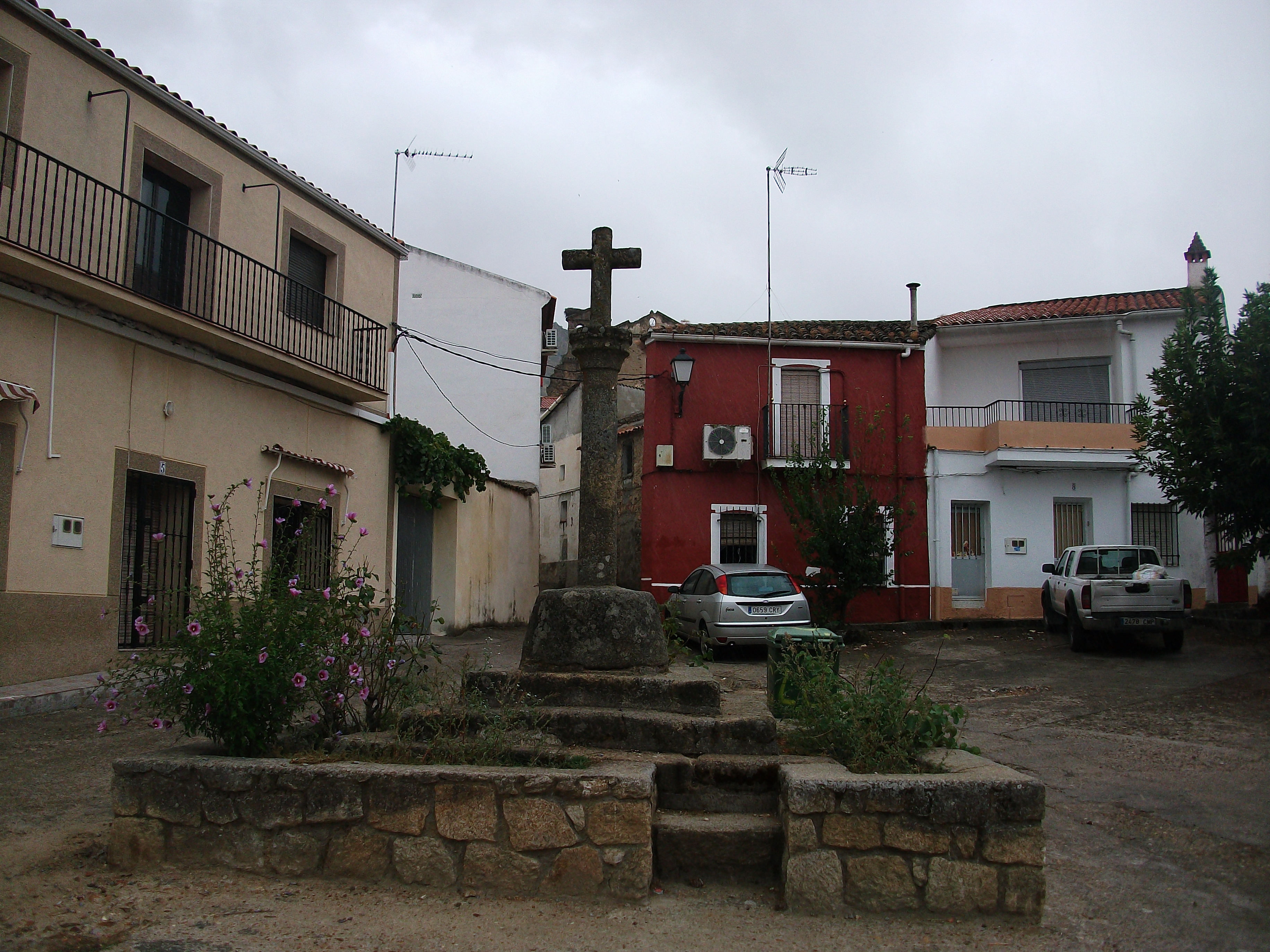 Imagen de la Plaza en Santa Cruz de la Sierra